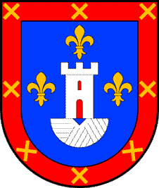 Escudo de la familia Molina.